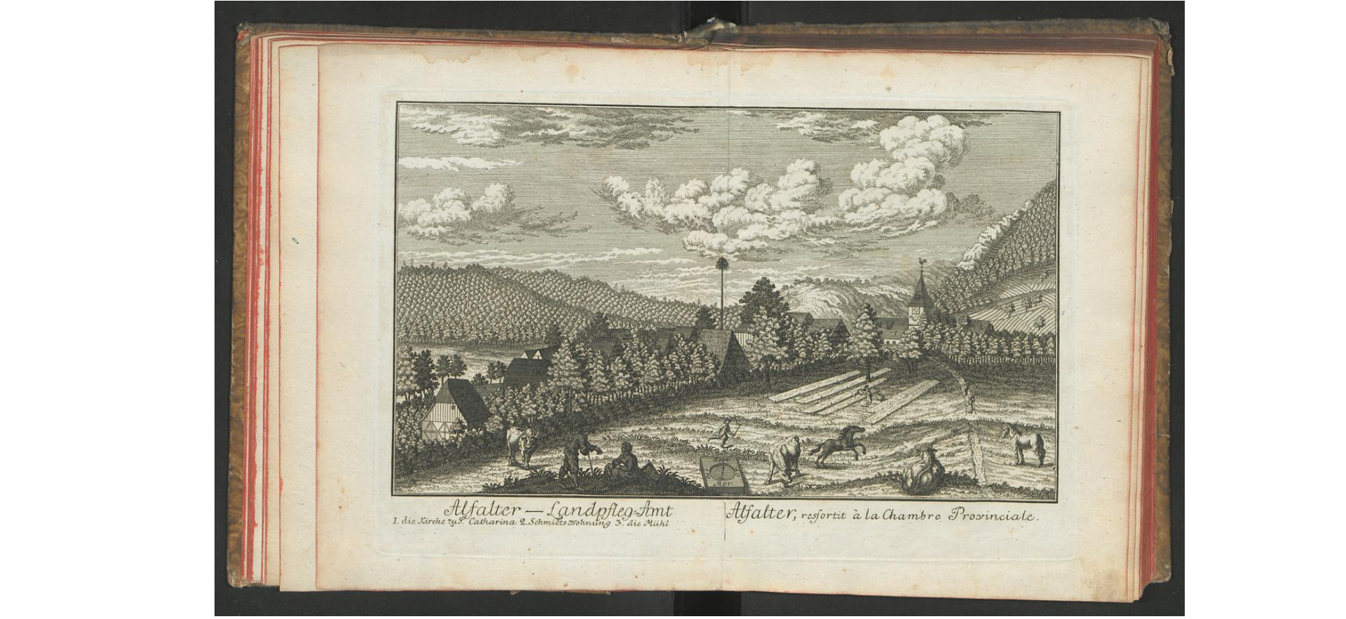 Prospecte aller Nürnbergischen Stædtlein Markt-Flecken und Pfarr-Dörffern